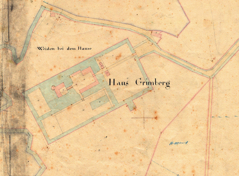 Lageplan des Schlosses Grimberg